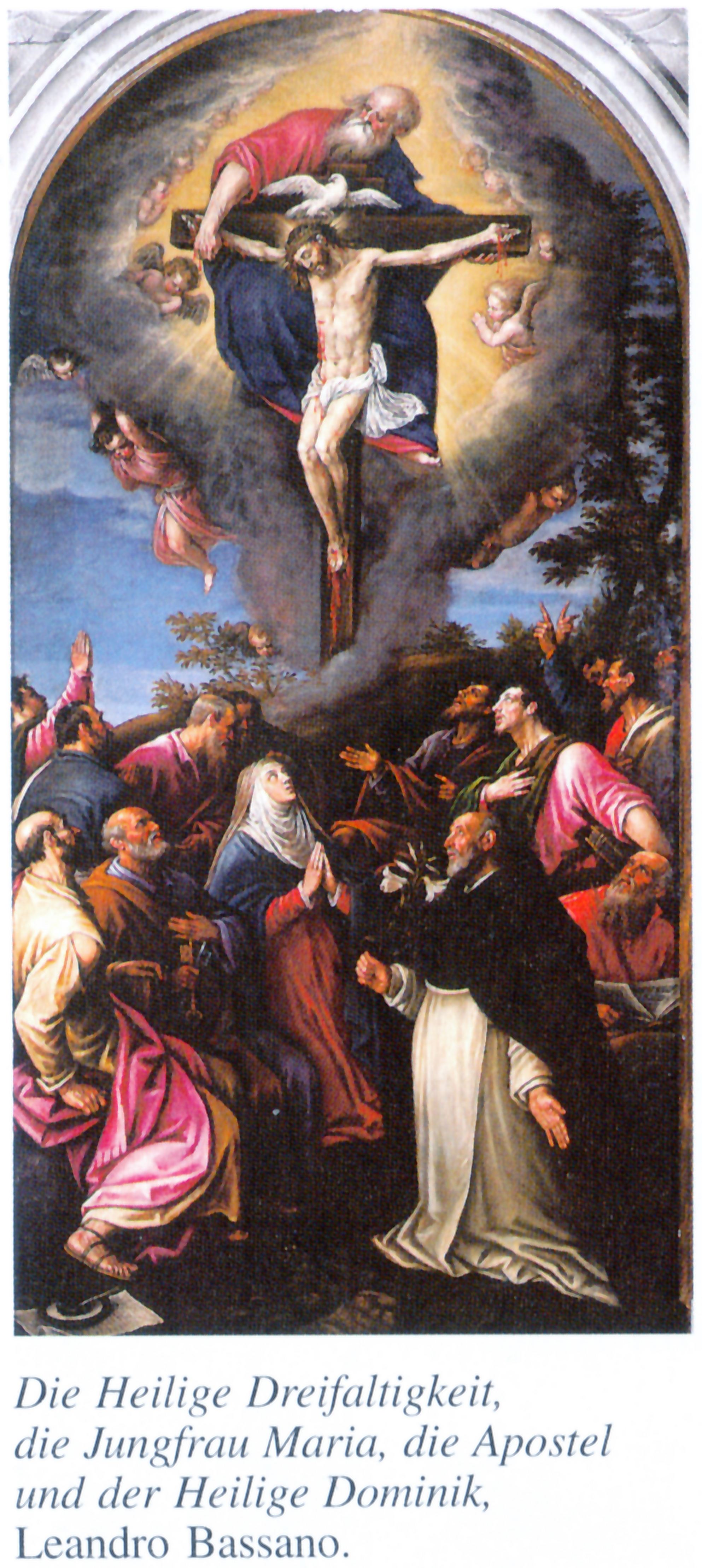 Hl. Dreifaltigkeit,Jungfrau Maria,Apostel u Hl. Dominik,Altarpainting 1590-95